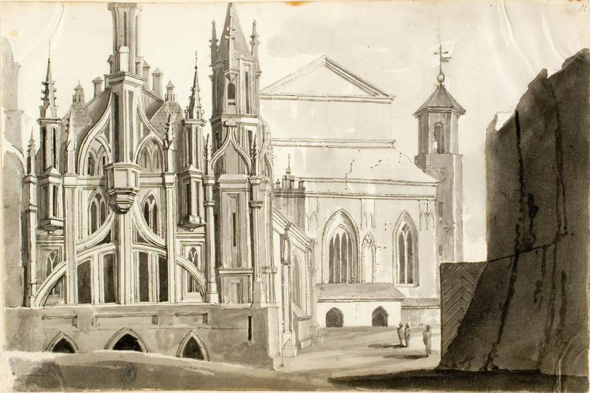 Беларуская (тарашкевіца): Вільня (Vilnia), вуліца Бэрнардынская (vulica Bernardynskaja). Касьцёл Сьвятой Ганны